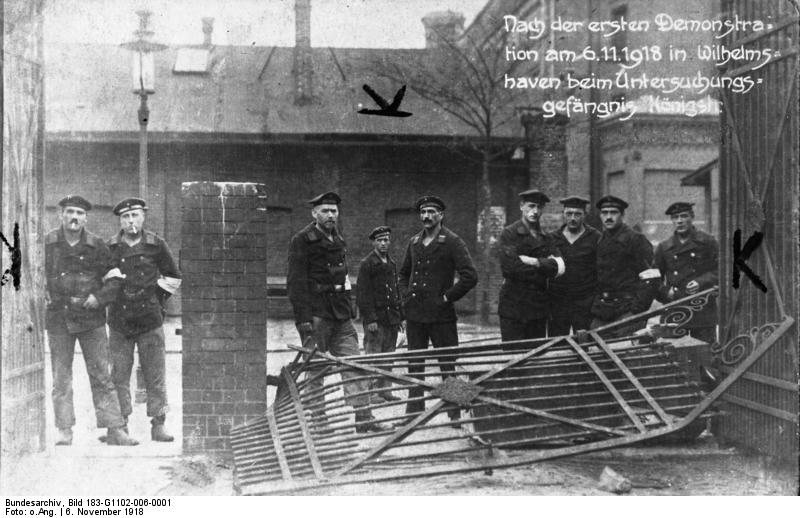 Wilhelmshaven, Novemberrevolution Nach der ersten Demonstration am 6.11.1918 in Wilhelmshaven bei Untersuchungsgefängnis Königstr[aße] Zentralbild, Archiv, 2.11.1968, Zum 50. Jahrestag der Novemberrevolution in Deutschland. Revolutionäre Matrosen an der Spitze der Revolution Am 5. November 1918 hatten Matrosen in Wilhelmshaven den Aufstand vorbereitet. Am 6. November morgens überwältigten sie die Wachen und bewaffneten sich. Über 10.000 Matrosen und Soldaten, denen sich die Werftarbeiter anschlossen, demonstrierten durch die Straßen der Stadt, befreiten ihre gefangenen Kameraden aus den Arrestanstalten (Auf dem Bild: Revolutionäre Matrosen nach der Erstürmung des Gefängnisses in der Königsstraße) und forderten die Errichtung einer sozialistischen Räterepublik. (am 6.11.1918)